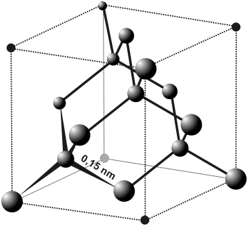 Estructura del diamante